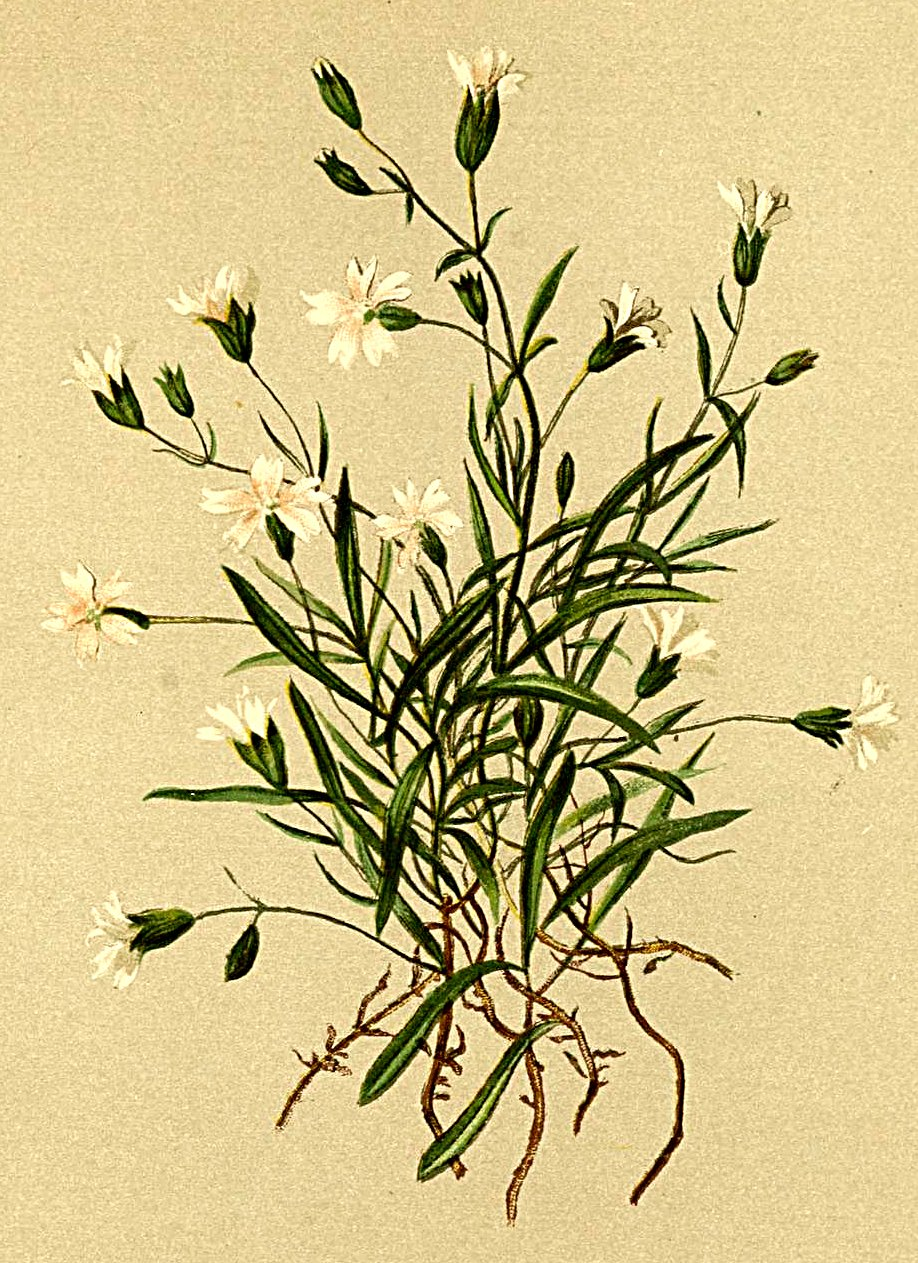 Silene alpestris